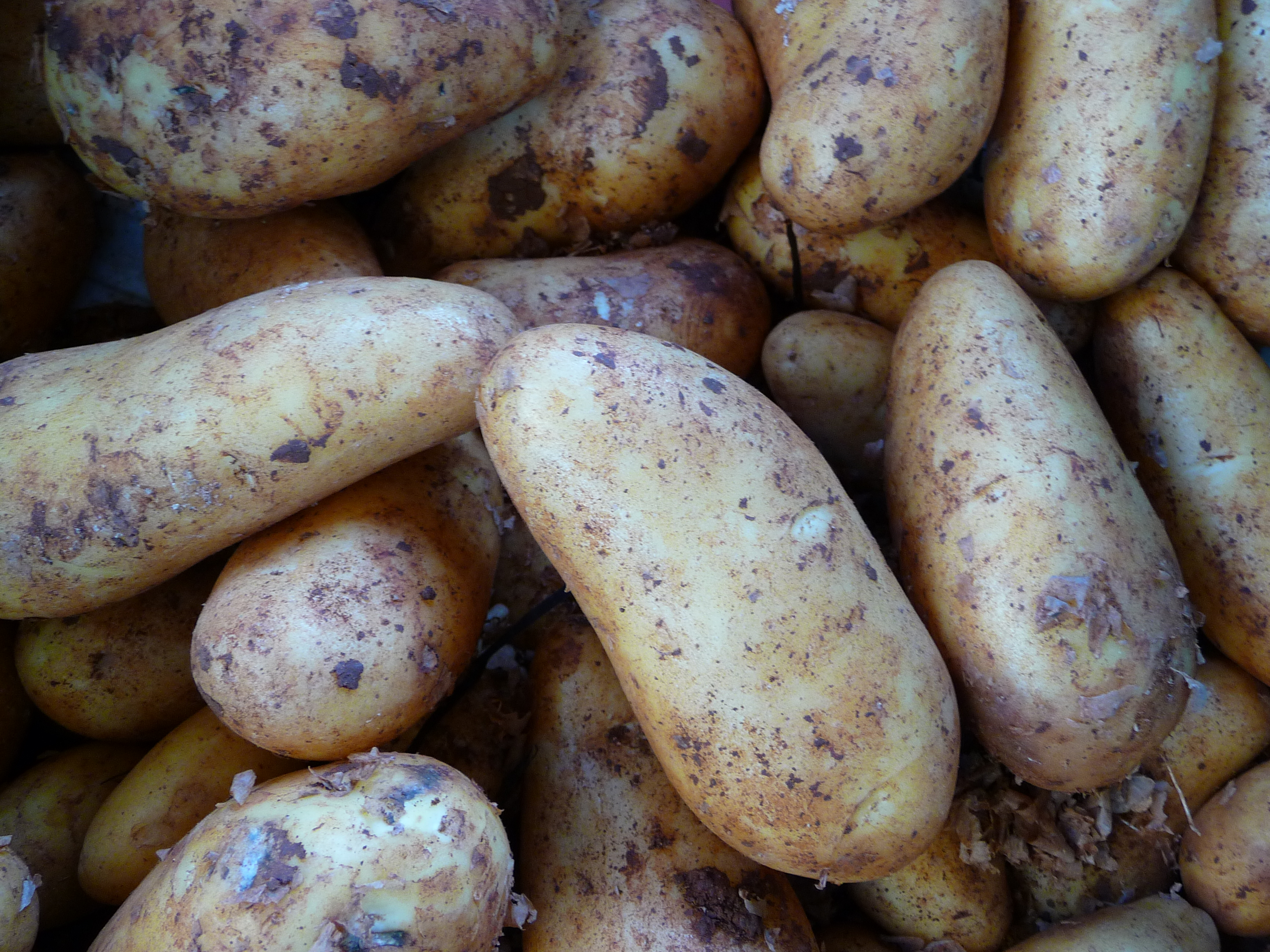 Kartoffel (Solanum tuberosum); hier: "Atlanta"; Herkunftsland Deutschland 1990. Reifezeit spät, Knolle rundoval, Schalenfarbe ocker, Fleischfarbe hellgelb, Augentiefe , Schale sehr glatt, vorwiegend festkochend, sehr lange Keimruhe.